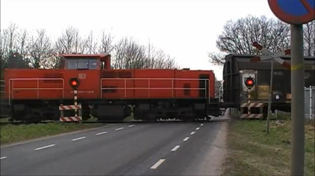 Haki overweg, Boortorenweg Hengelo